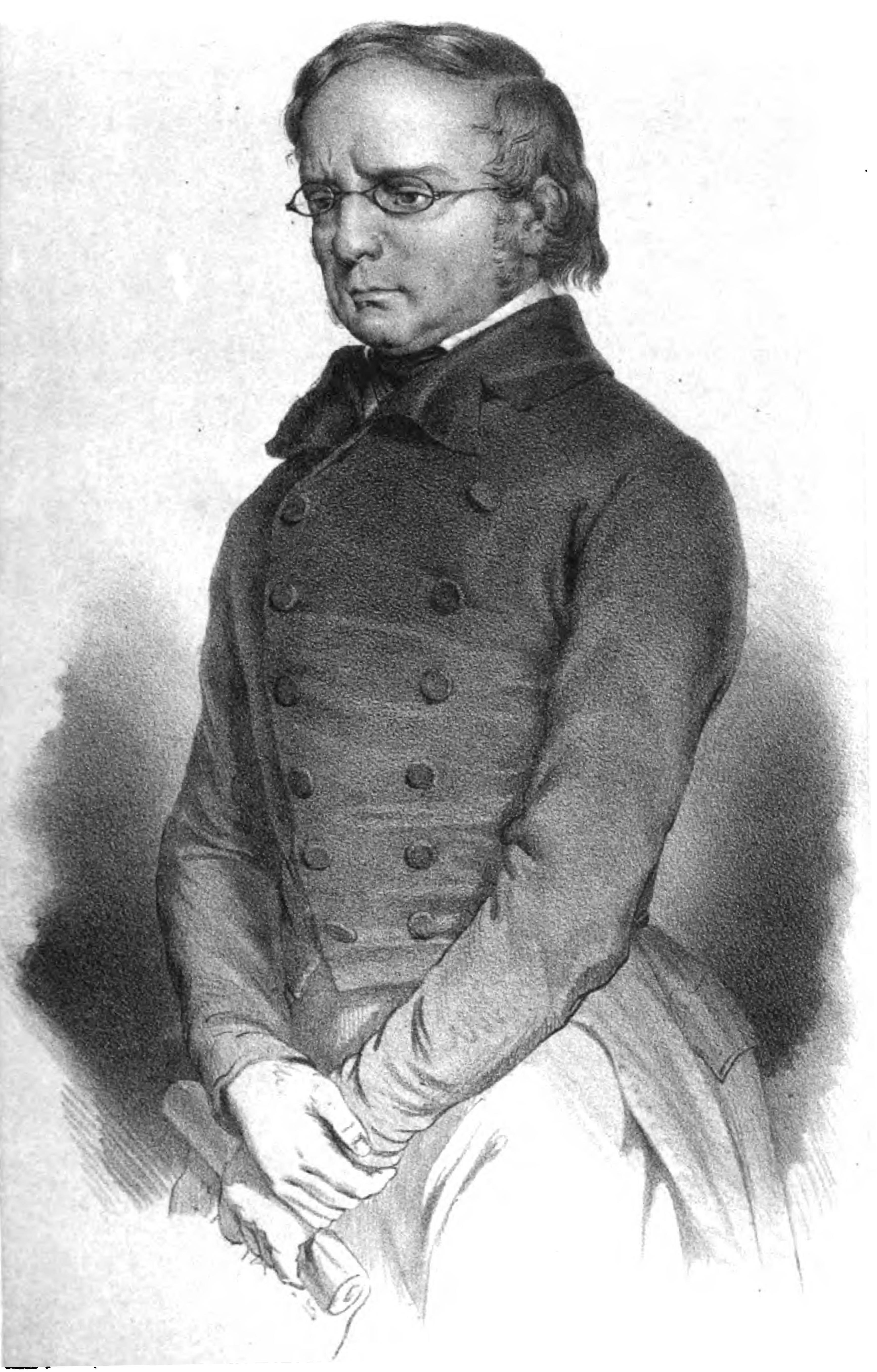 Illustrazione del libro La Italia - Storia di due anni 1848-1849 , di Candido Augusto Vecchi, Claudio Perrin, Torino, 1851.